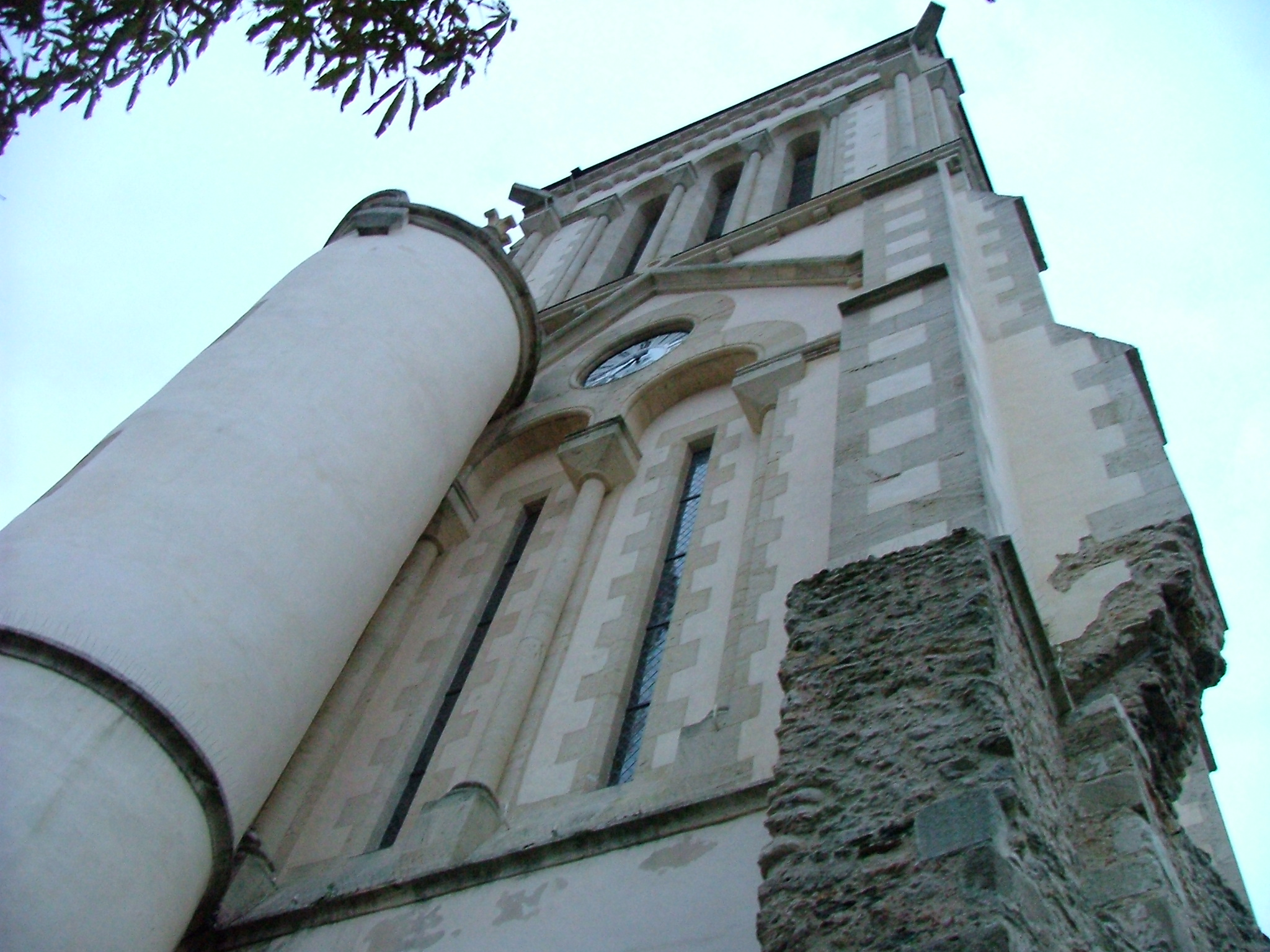 Clocher de la vieille église de Challans